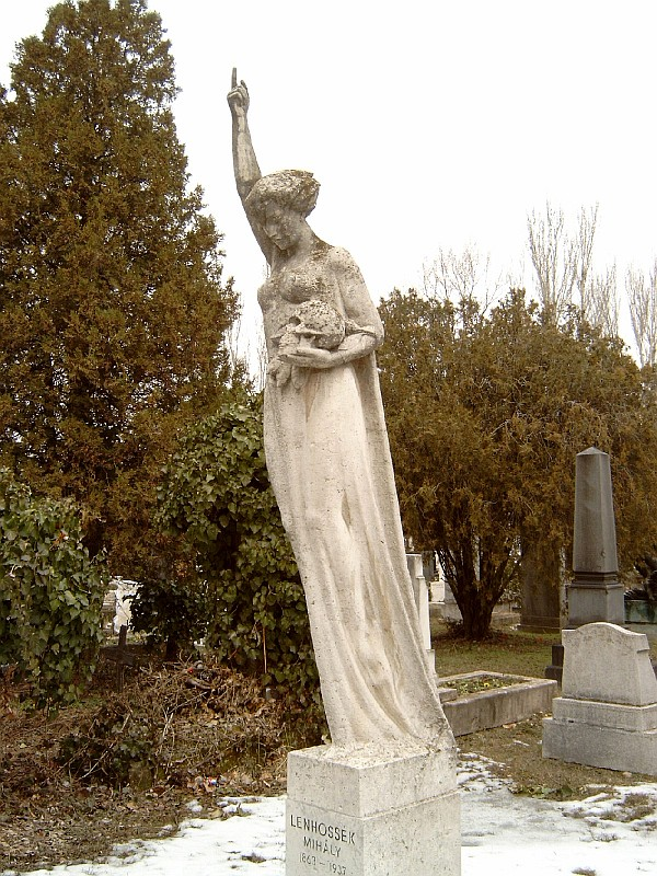 Lenhossék Mihály (Pest, 1863. aug. 28. – Bp., 1937. jan. 26.): anatómus, egyetemi tanár sírja Budapesten. Kerepesi temető: 34-4-14 [szobrász: Fülöp Elemér].